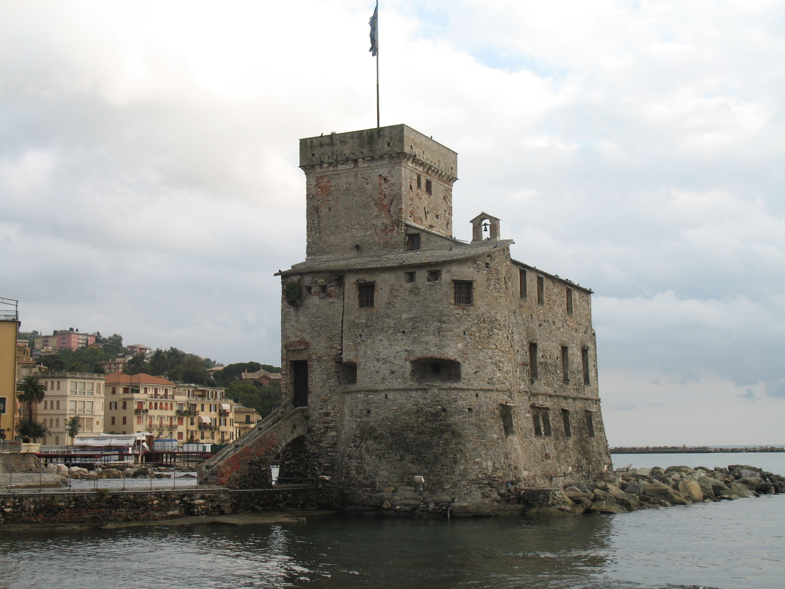 Serie di Immagini da Rapallo e San Michele di Pagana (Rapallo), in provincia di Genova